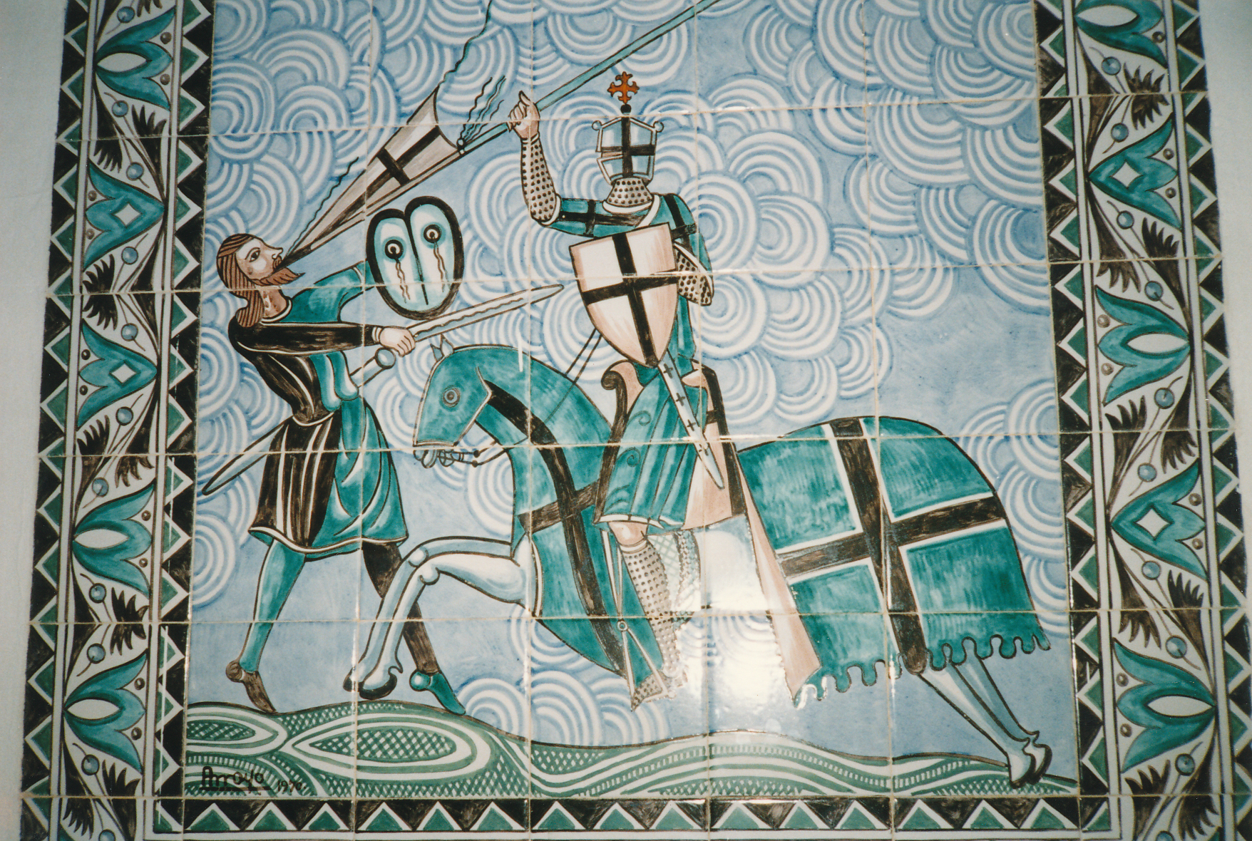 Kampfszene auf der vormaligen Klosterburg des Calatrava-Ritterordens in Alcañiz Datum: 06/1989 Urheber: Michael Pfeiffer Quelle: privates Fotoalbum des Urhebers